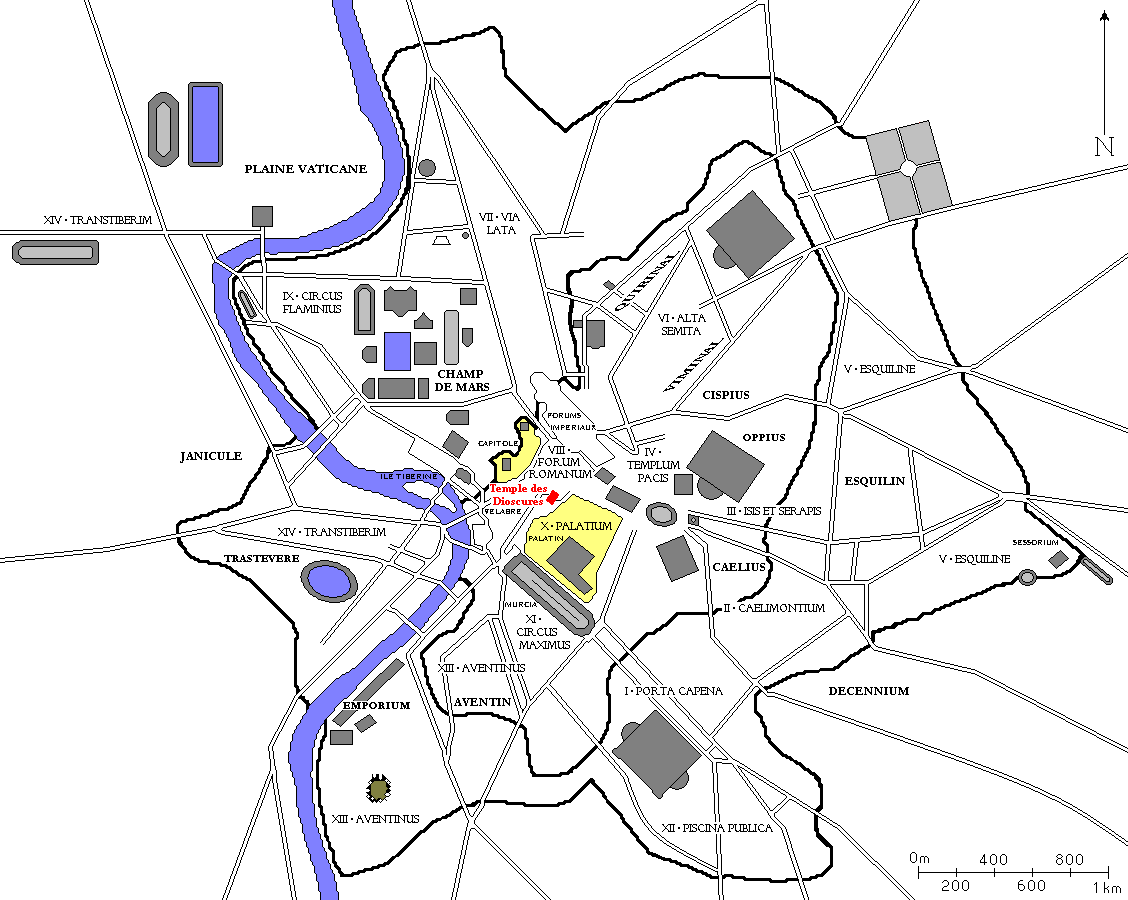 Plan de Rome redessiné à partir de diverses sources. Tous les bâtiments importants construits jusqu'à la fin de l'Empire romain sont dessinés, ainsi que les régions d'Auguste et les collines de Rome.